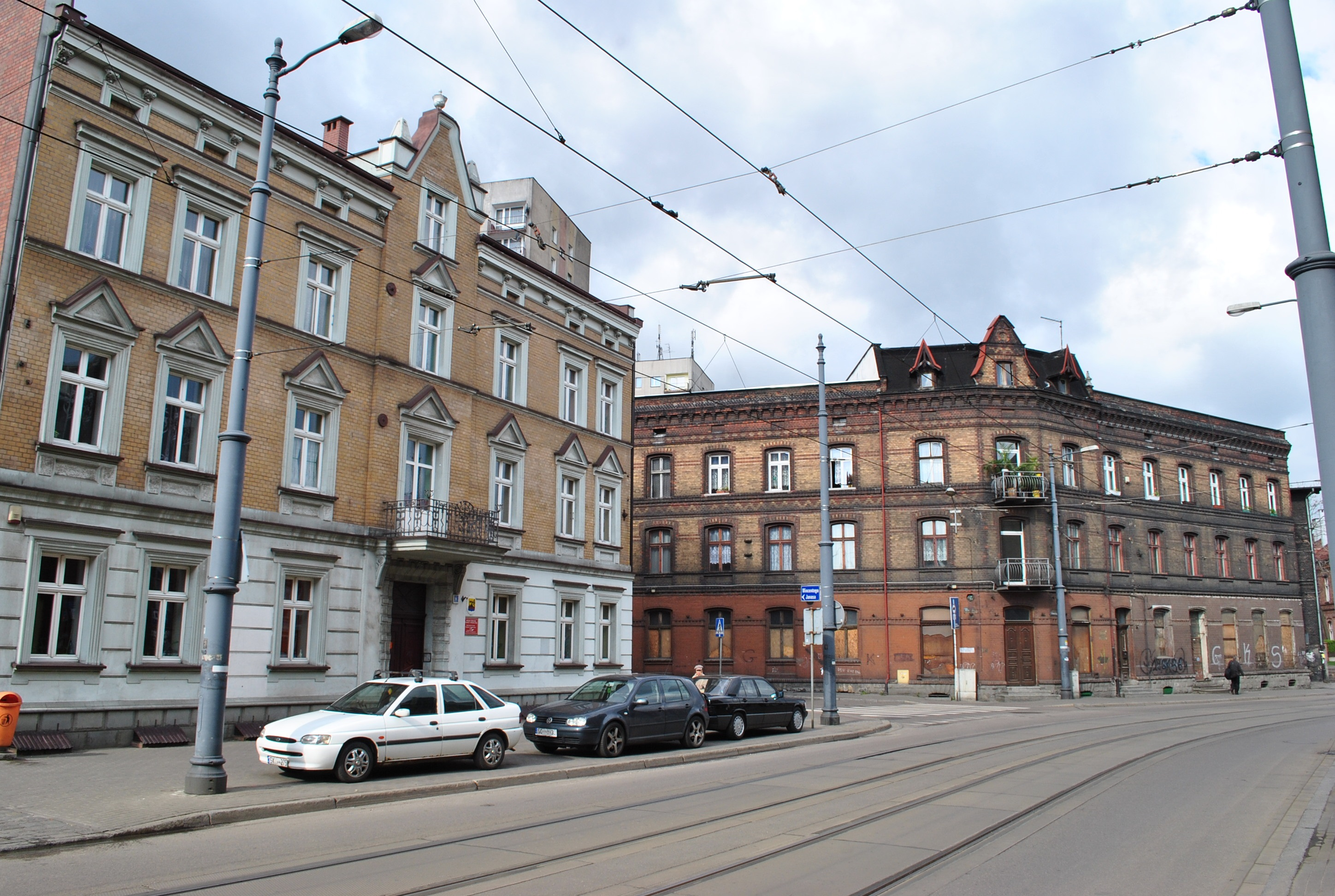 Katowice - Załęże. Budynek MOPS (po lewej) i kamienica narożna na skrzyżowaniu ulic: Janasa i Gliwickiej